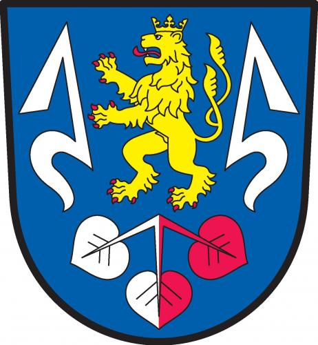 Nová Ves, znak obce